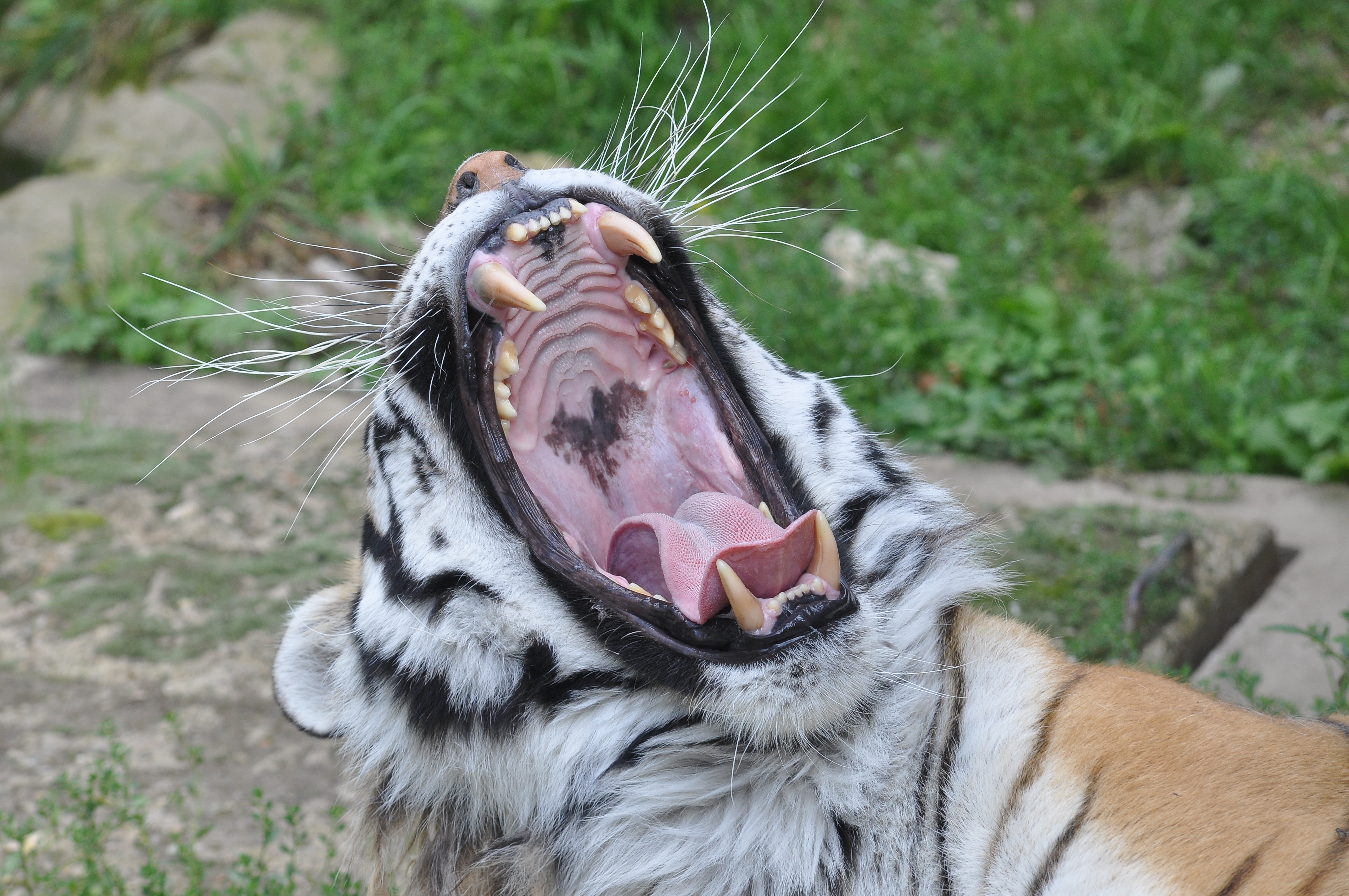 BESANCON: Un Tigre de Sibérie.